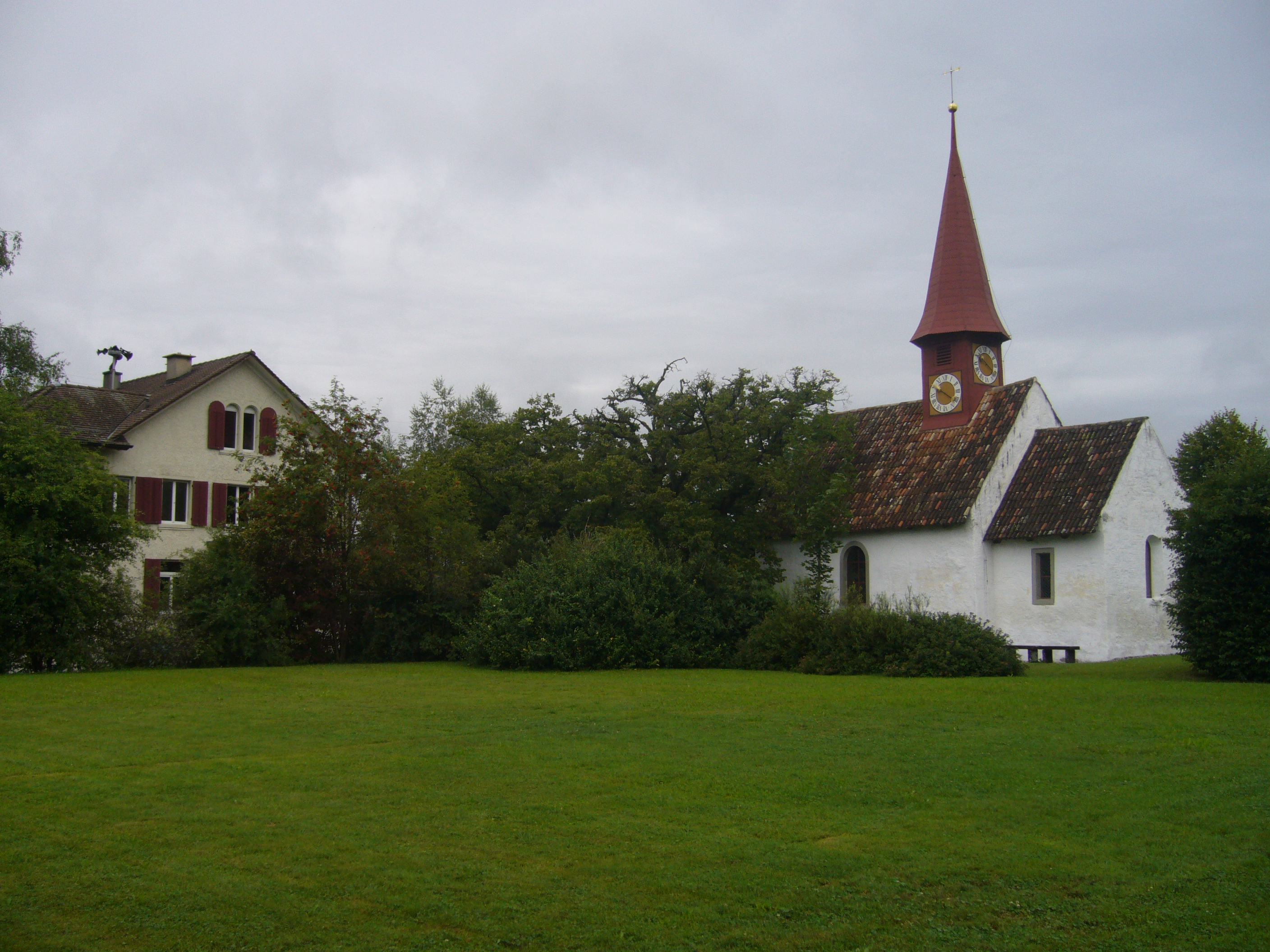 Schulhaus Breite und St. Oswalds-Capelle.